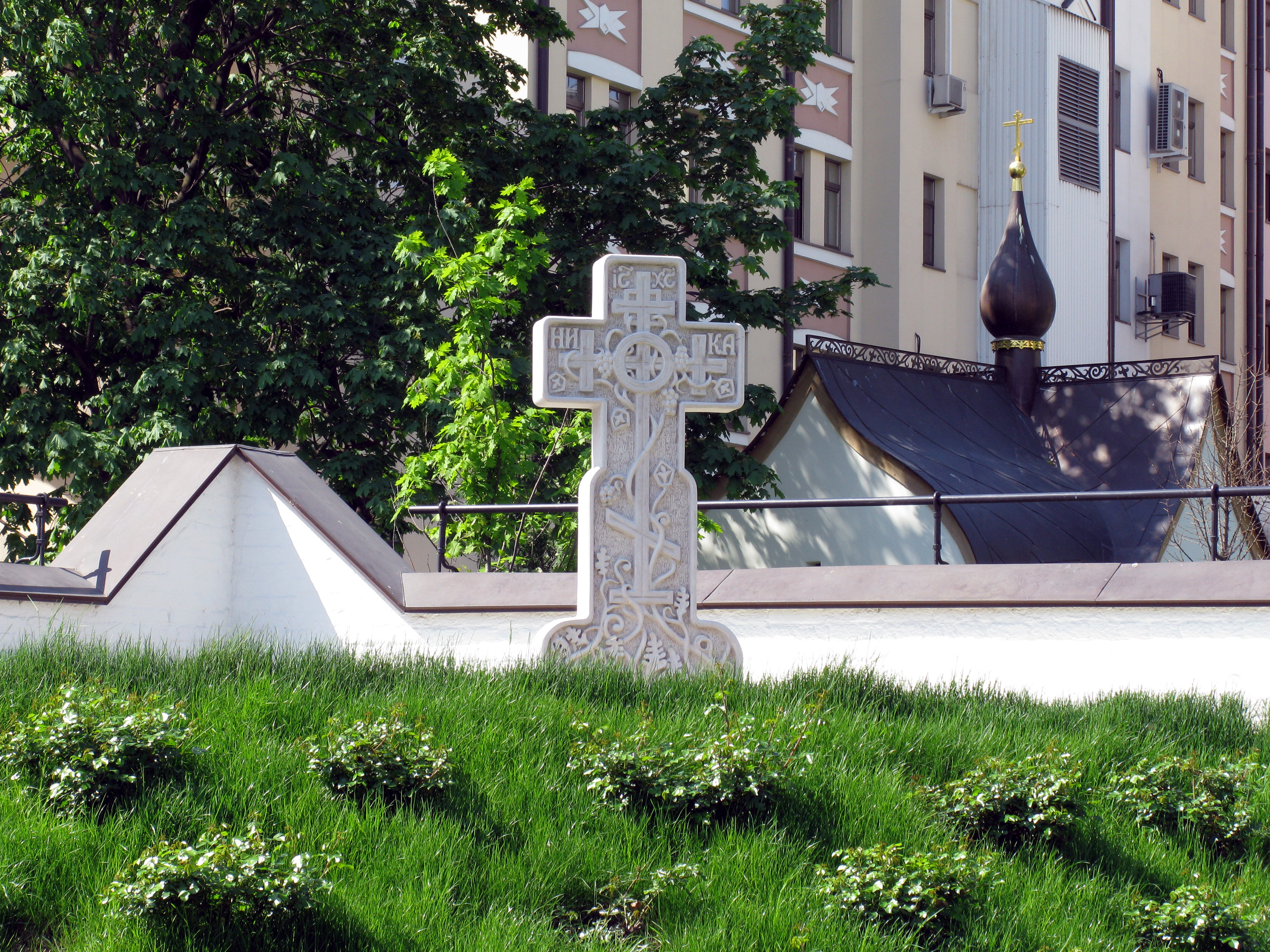 Марфо-Мариинская обитель милосердия. Памятный крест алапаевским мученикам на «Голгофе». («Голгофой» сестры называли небольшой холмик в глубине сада. Происхождение этого названия достоверно не известно.)